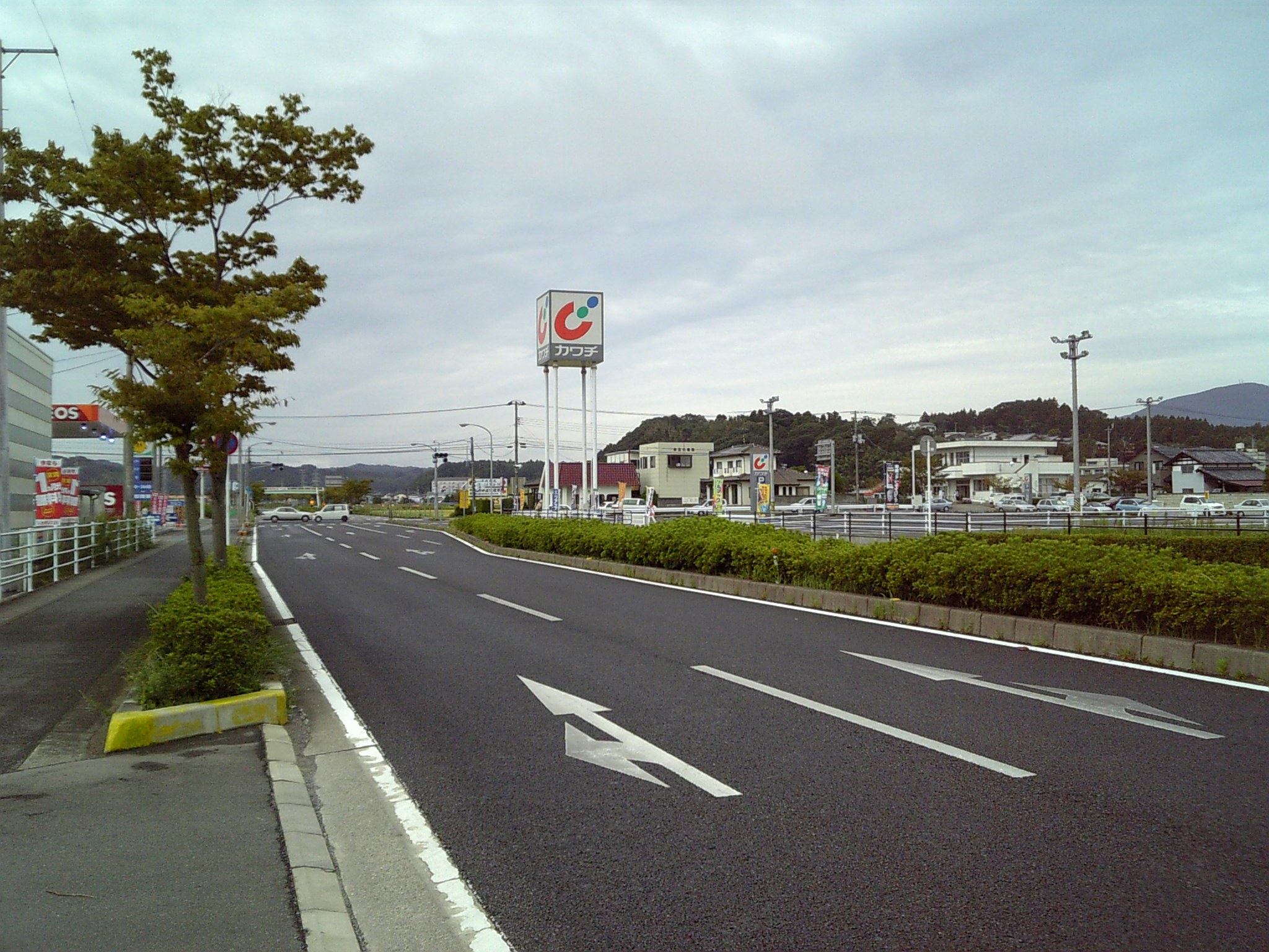 福島県道14号いわき石川線のバイパス部分。